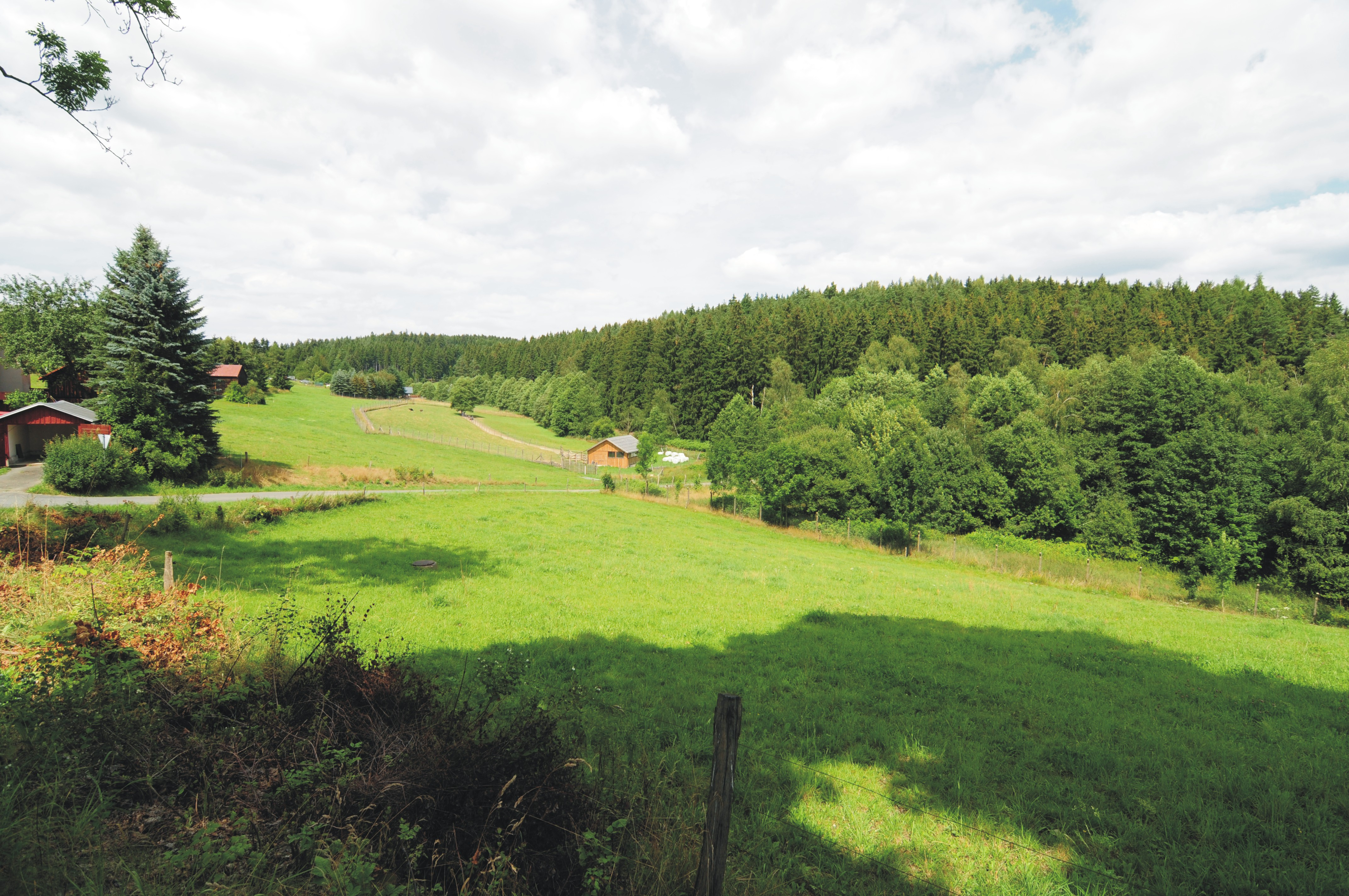 Tal des Zinnbachs in Gettengrün (Adorf, Sachsen, Deutschland)